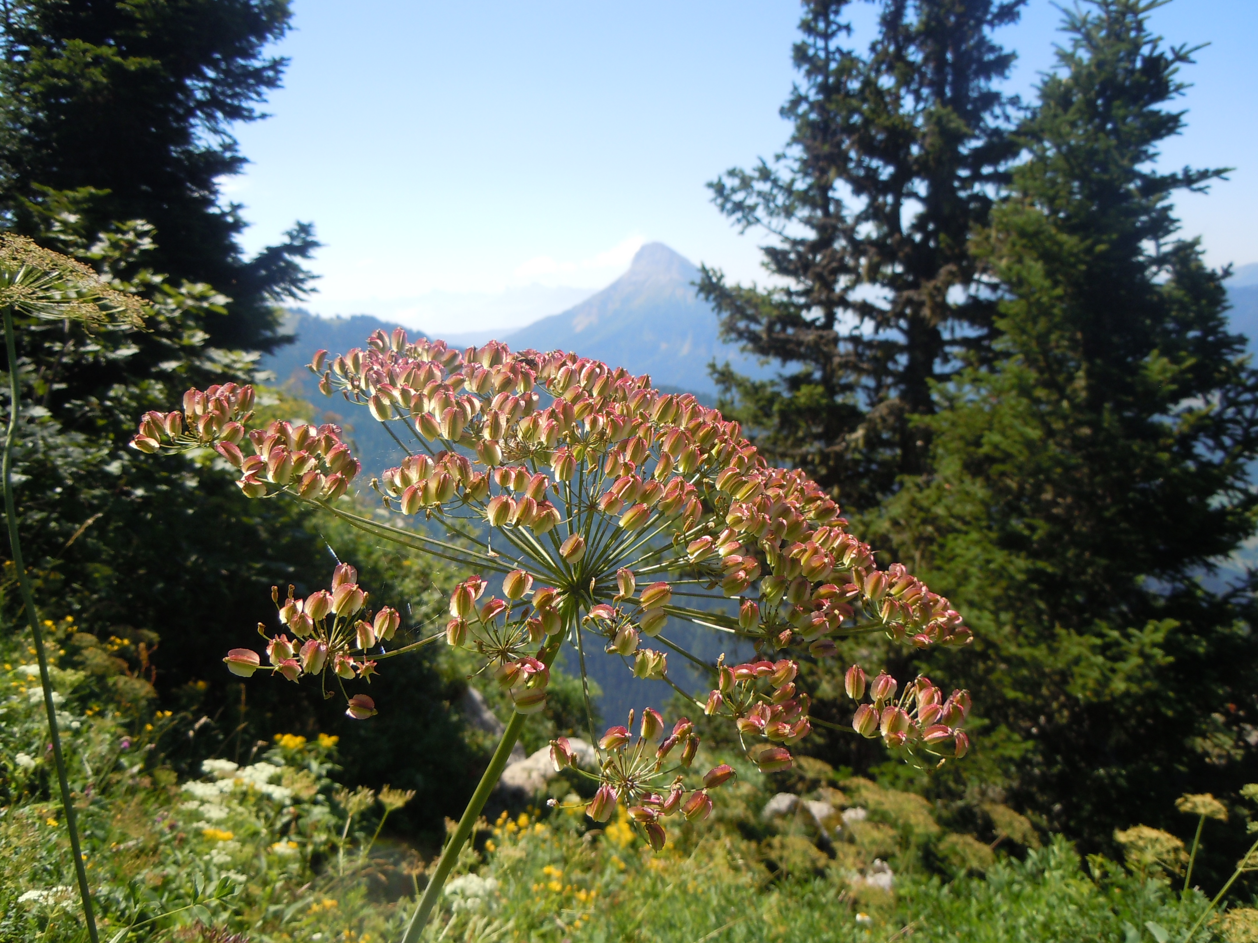 Graines de Laserpitium siler au Bec de la Scia, vue sur Chamechaude